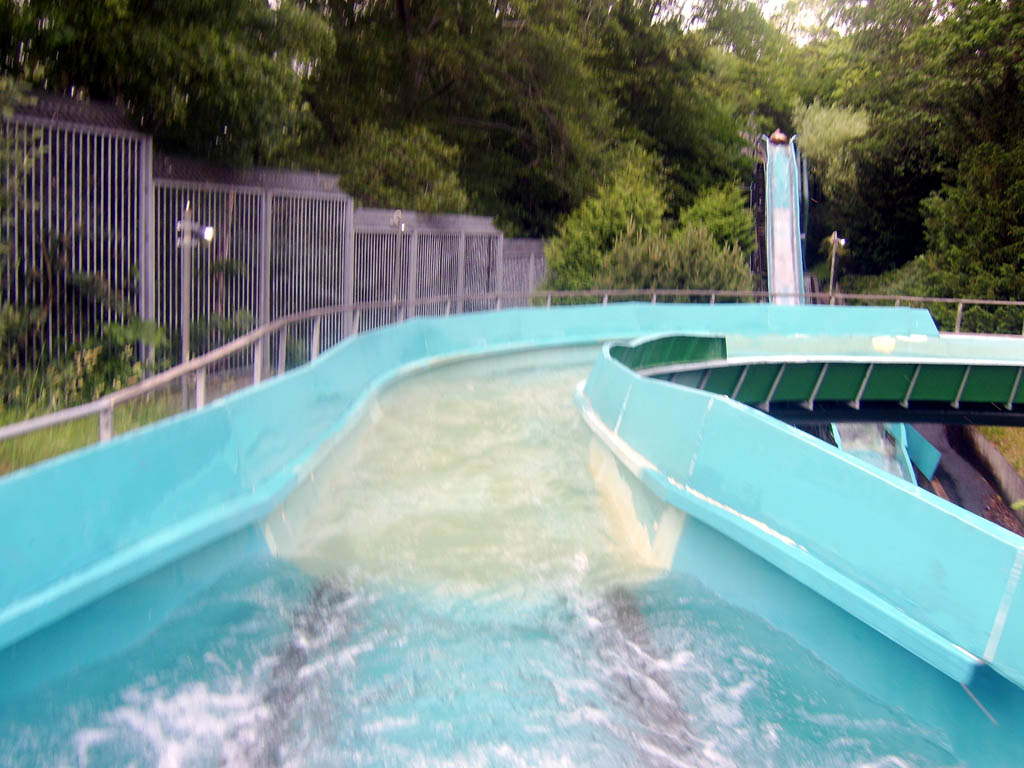 A log flume amusement ride, Flumeride at Liseberg, Sweden. Taken June 2006